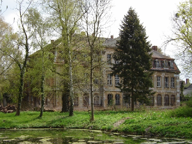 Ruine des Neu Königsborner Schlosses, Königsborn (Sachsen-Anhalt)